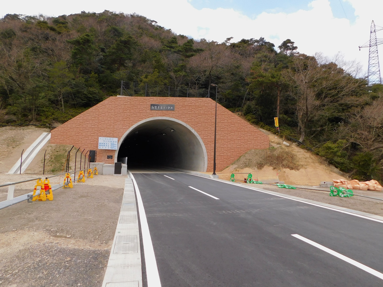 福井県道141号竹波立石縄間線の敦賀半島トンネル、2020年3月20日供用開始。